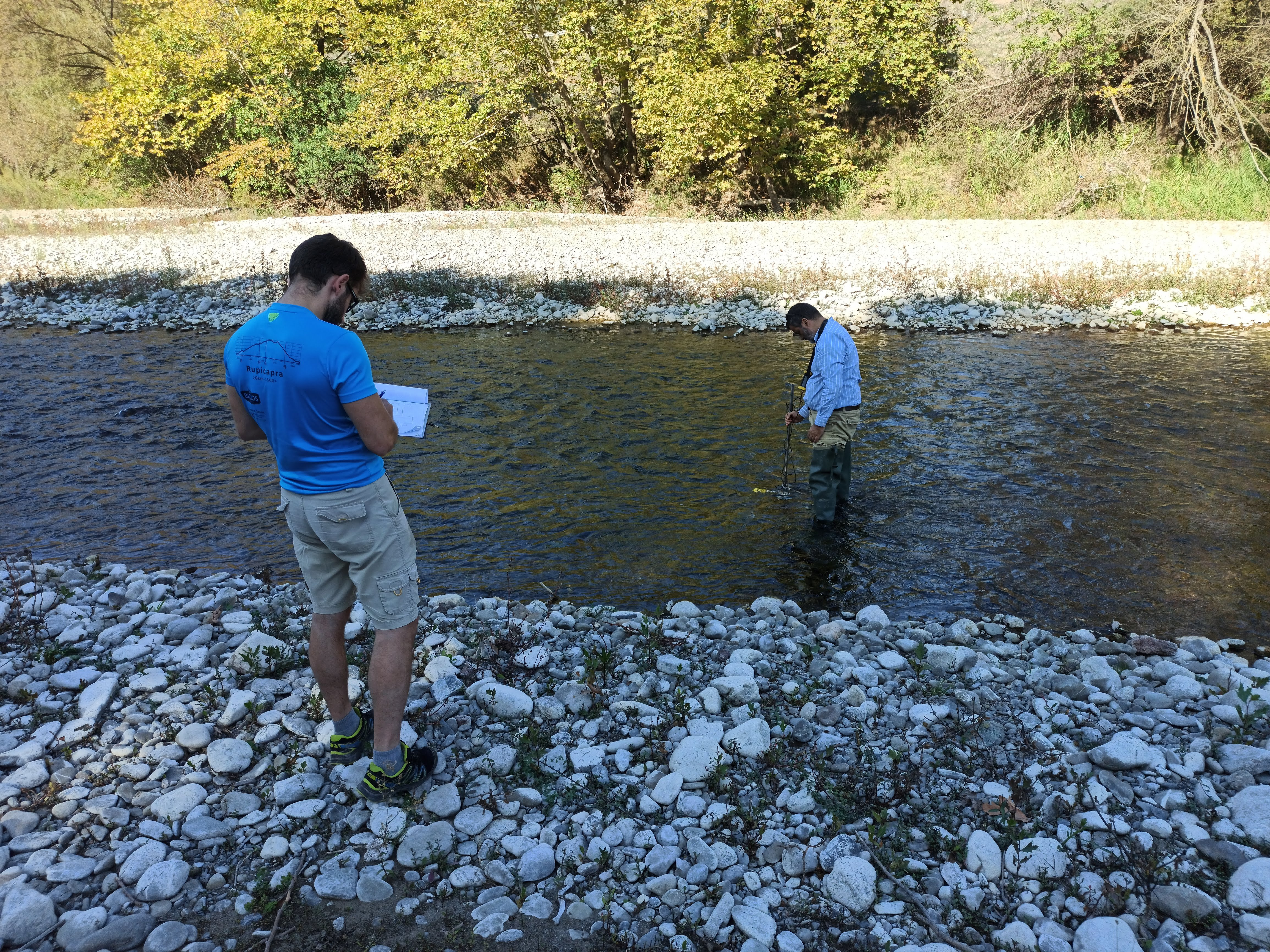 Μέτρηση της παροχής στον ποταμό Σπερχειό.